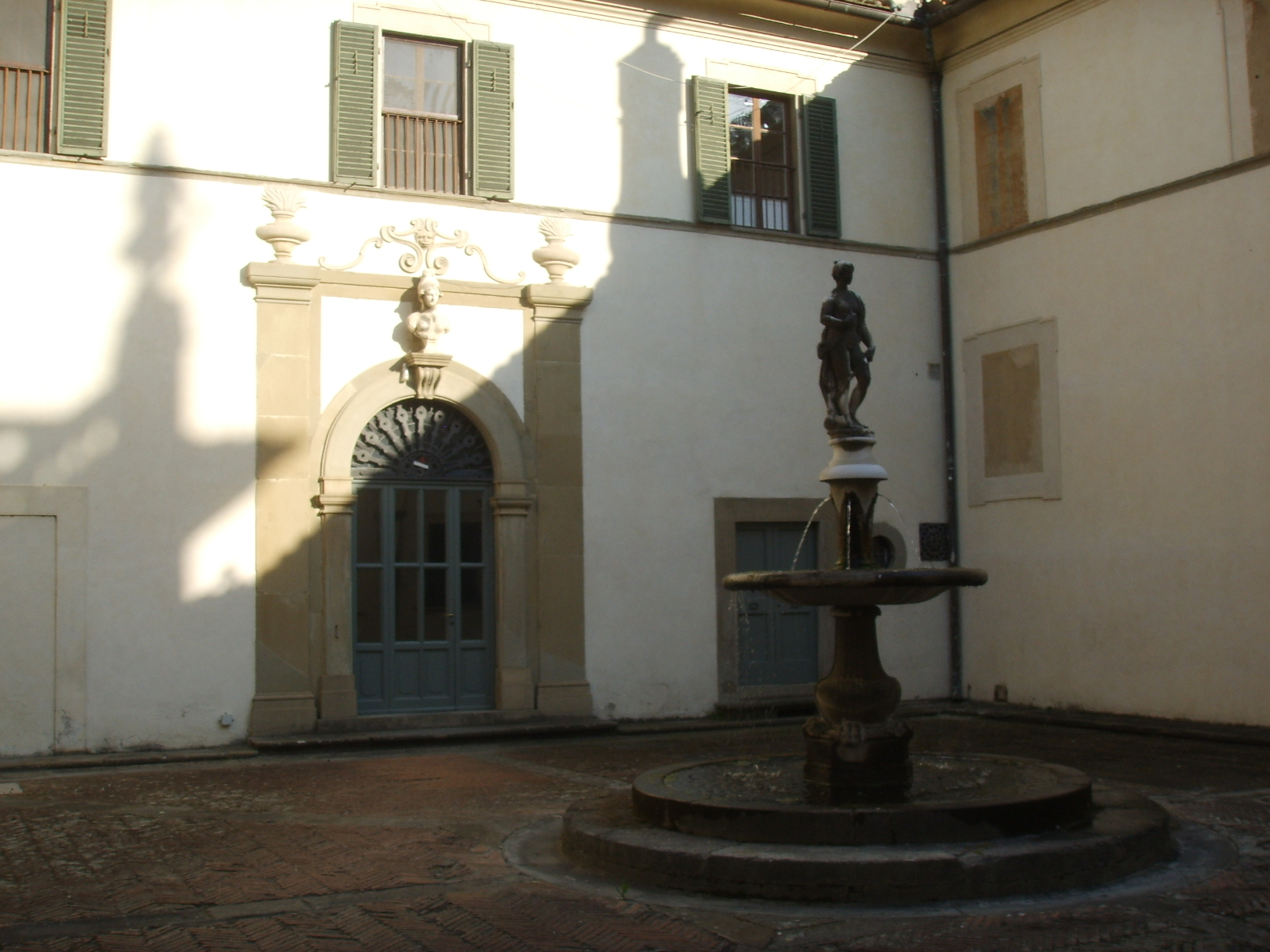 Villa guicciardini corsi salviati cortile